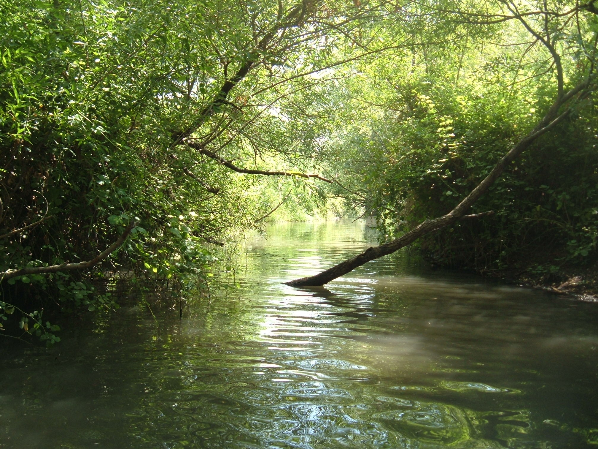 Majraseh section of Daliot stream in the Golan hights.קטע המג'רסה בנחל דליות ברמת הגולן